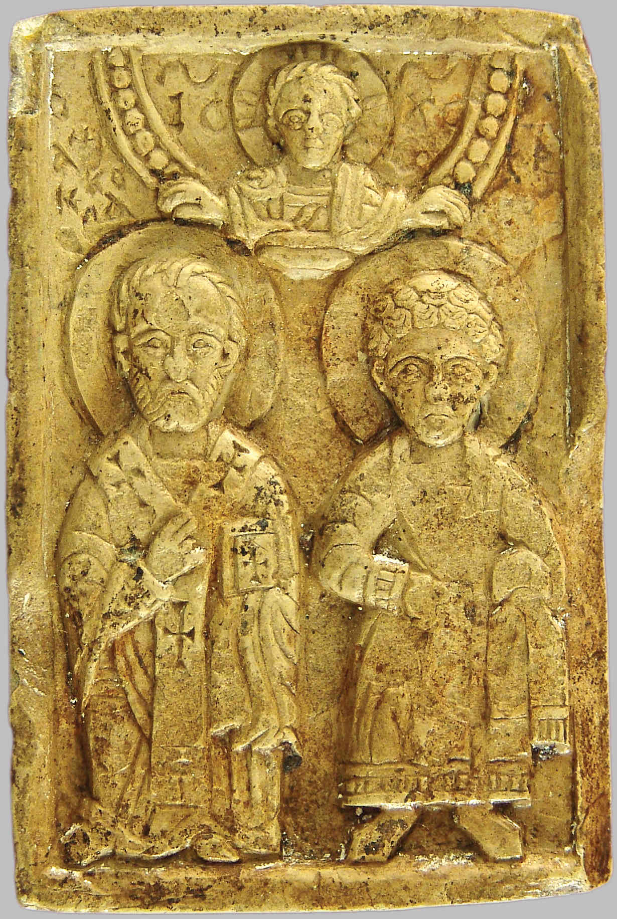 6×4×0,7 см